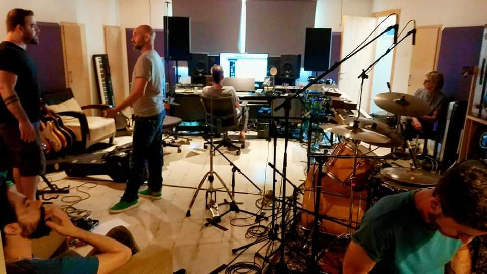 עם דודי לוי באולפן